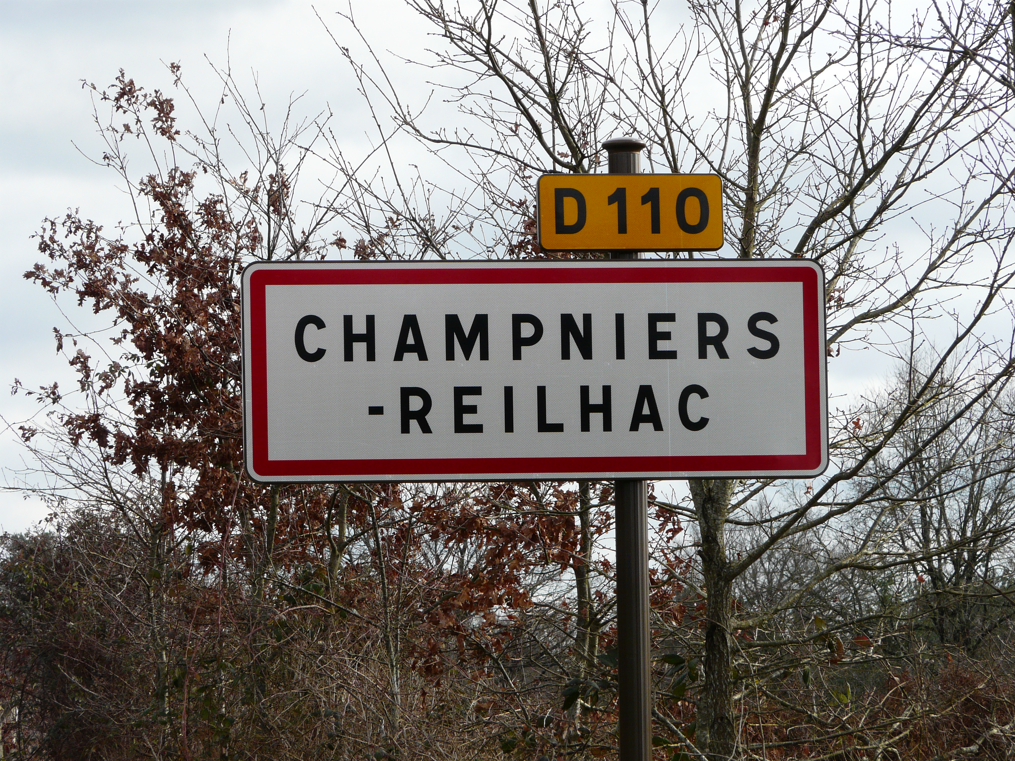 Panneau d'entrée à Champniers-et-Reilhac, Dordogne, France.